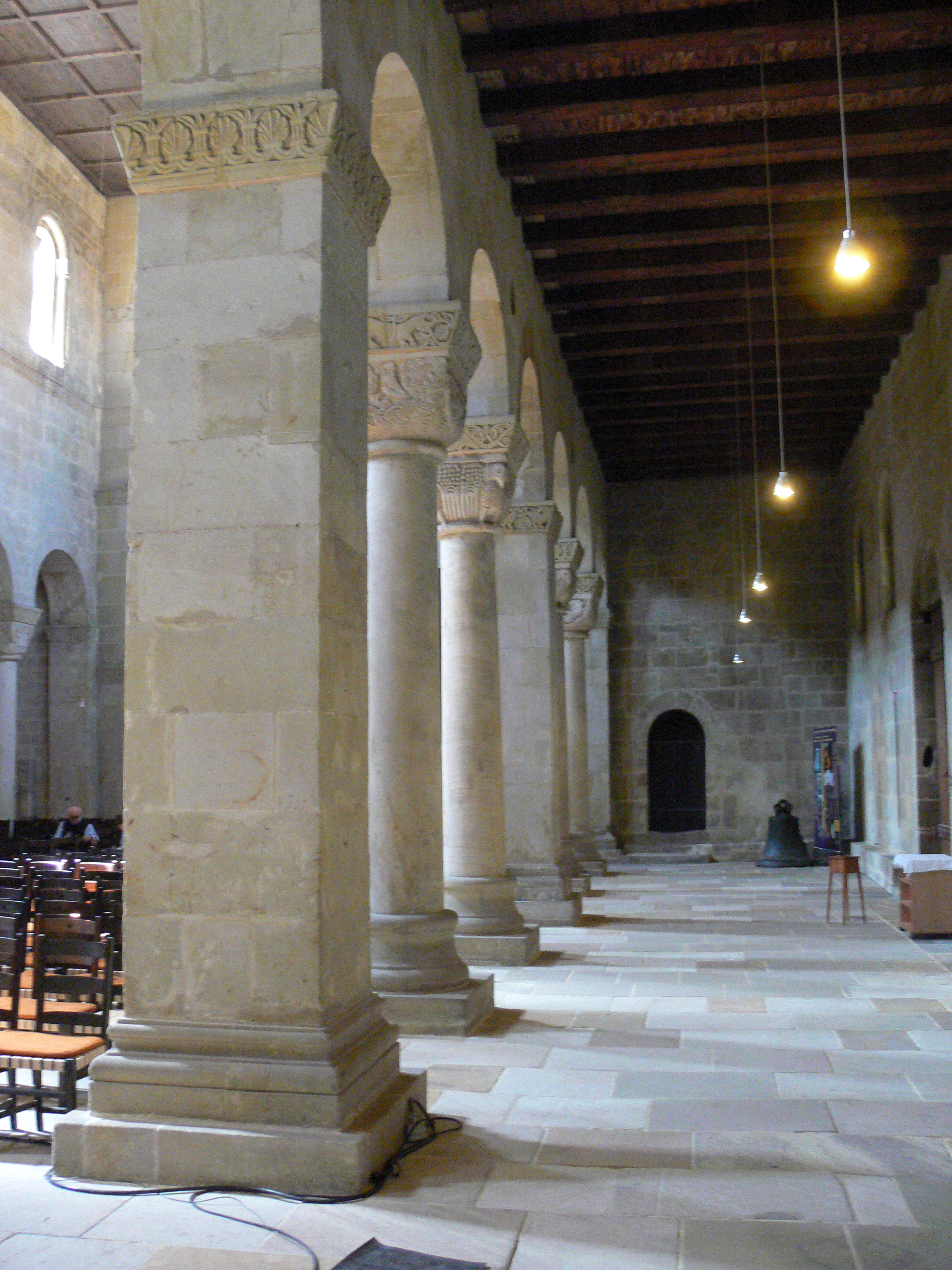 Stiftskirche in Quedlinburg. "Niedersächsischer Stützenwechsel" (abwechselnd Pfeiler und Säulen).